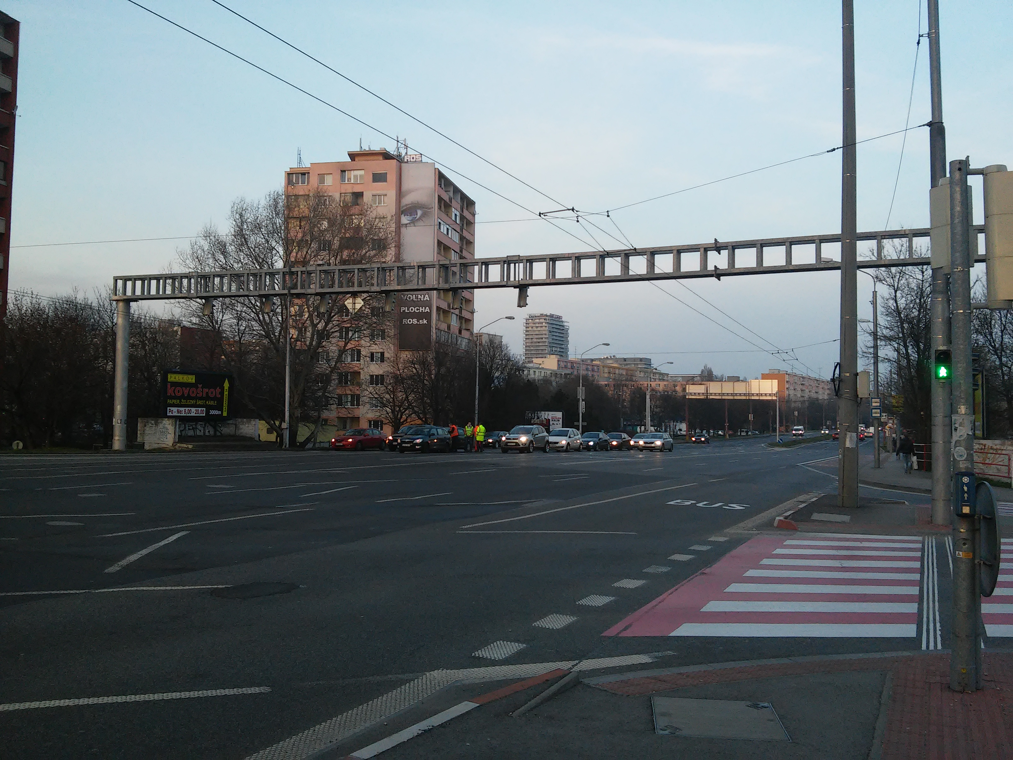 Gagarinova ulica, Bratislava - Ružinov